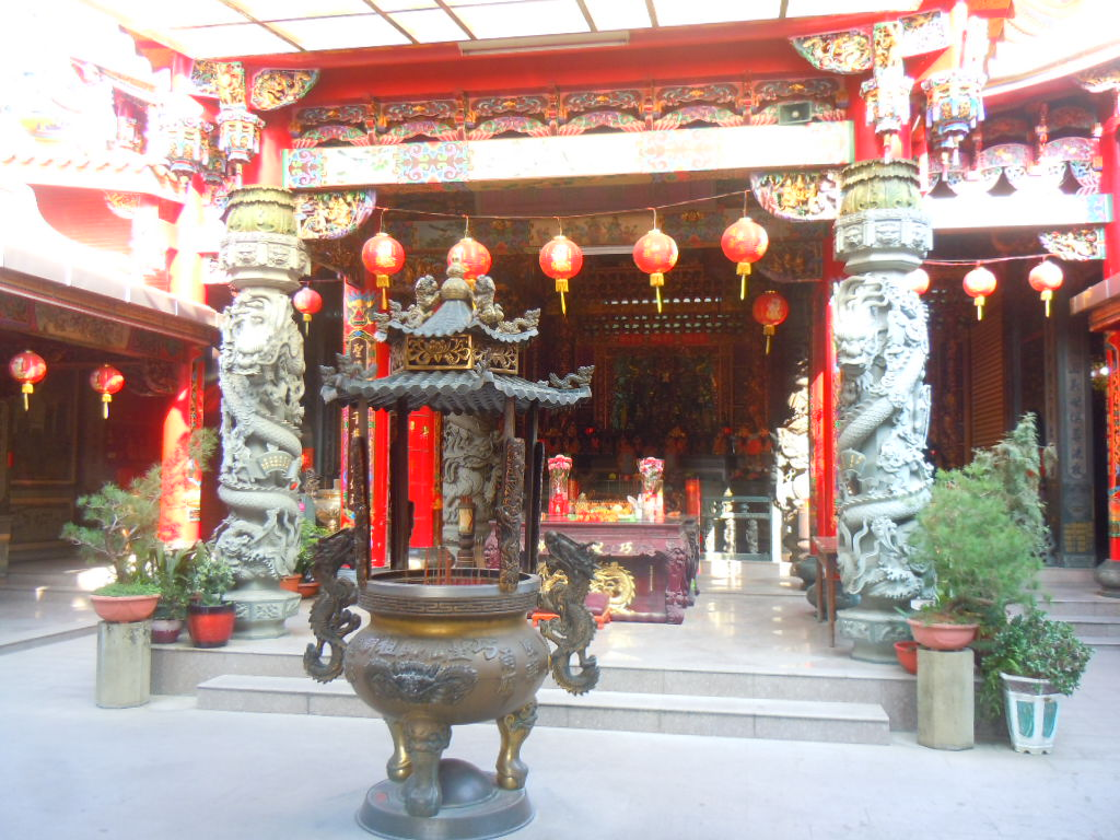 中文(繁體):東勢巧聖仙師祖廟的所在地:臺中市東勢區東寧里匠寮巷52號。